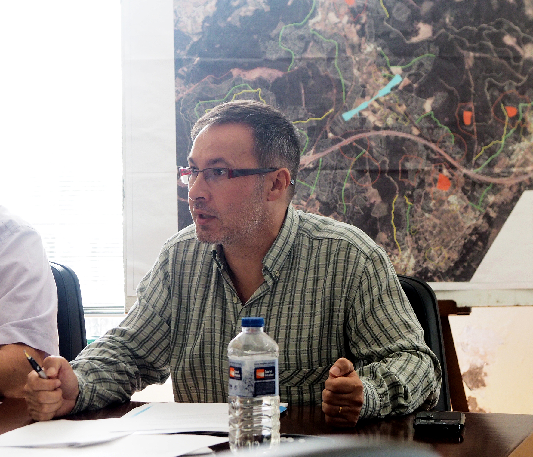 Xoán B. Mariño Abuín nun pleno do Concello de Dodro